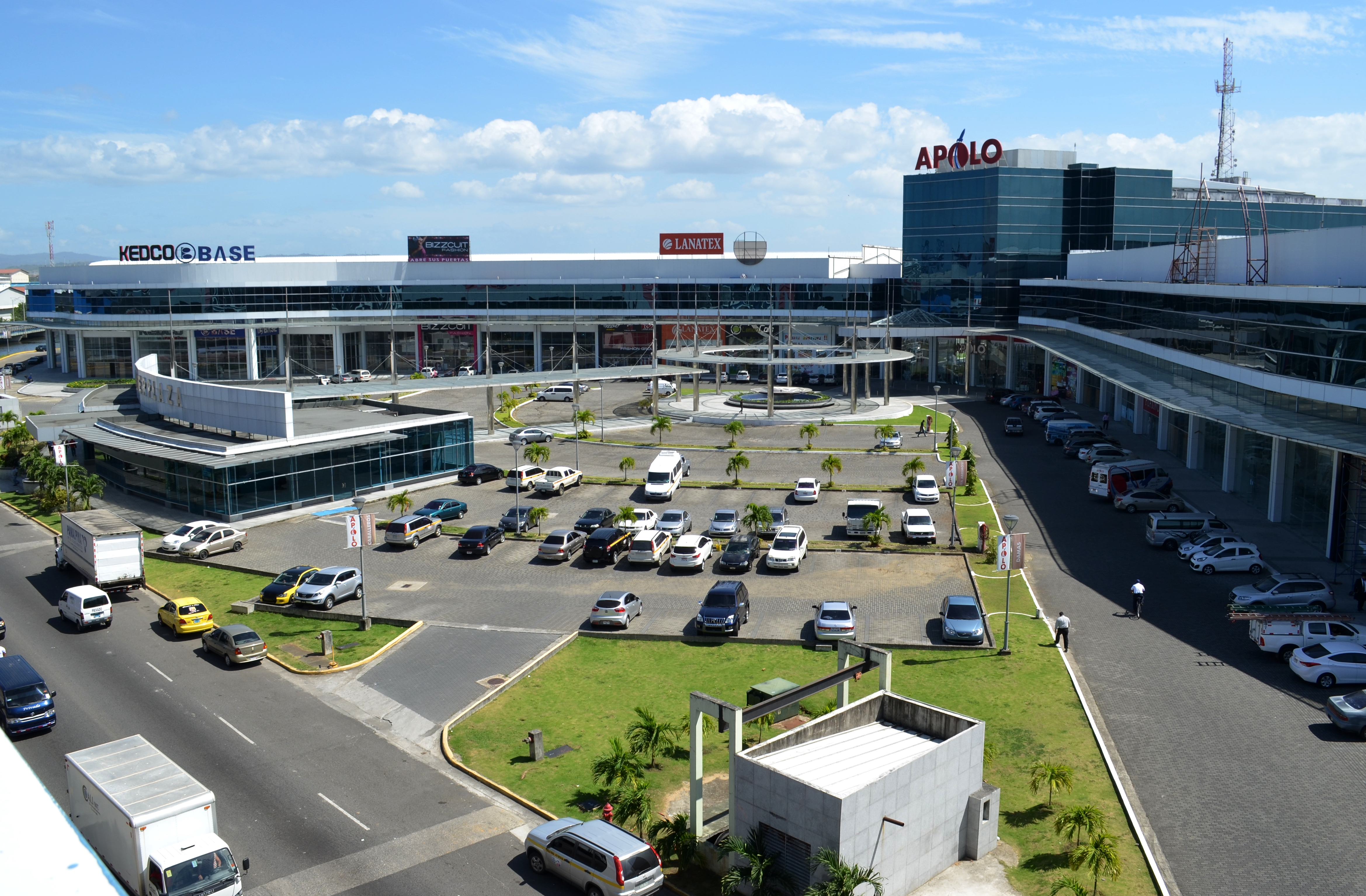 Zona Libre de Colón - Colón Free Trade Zone